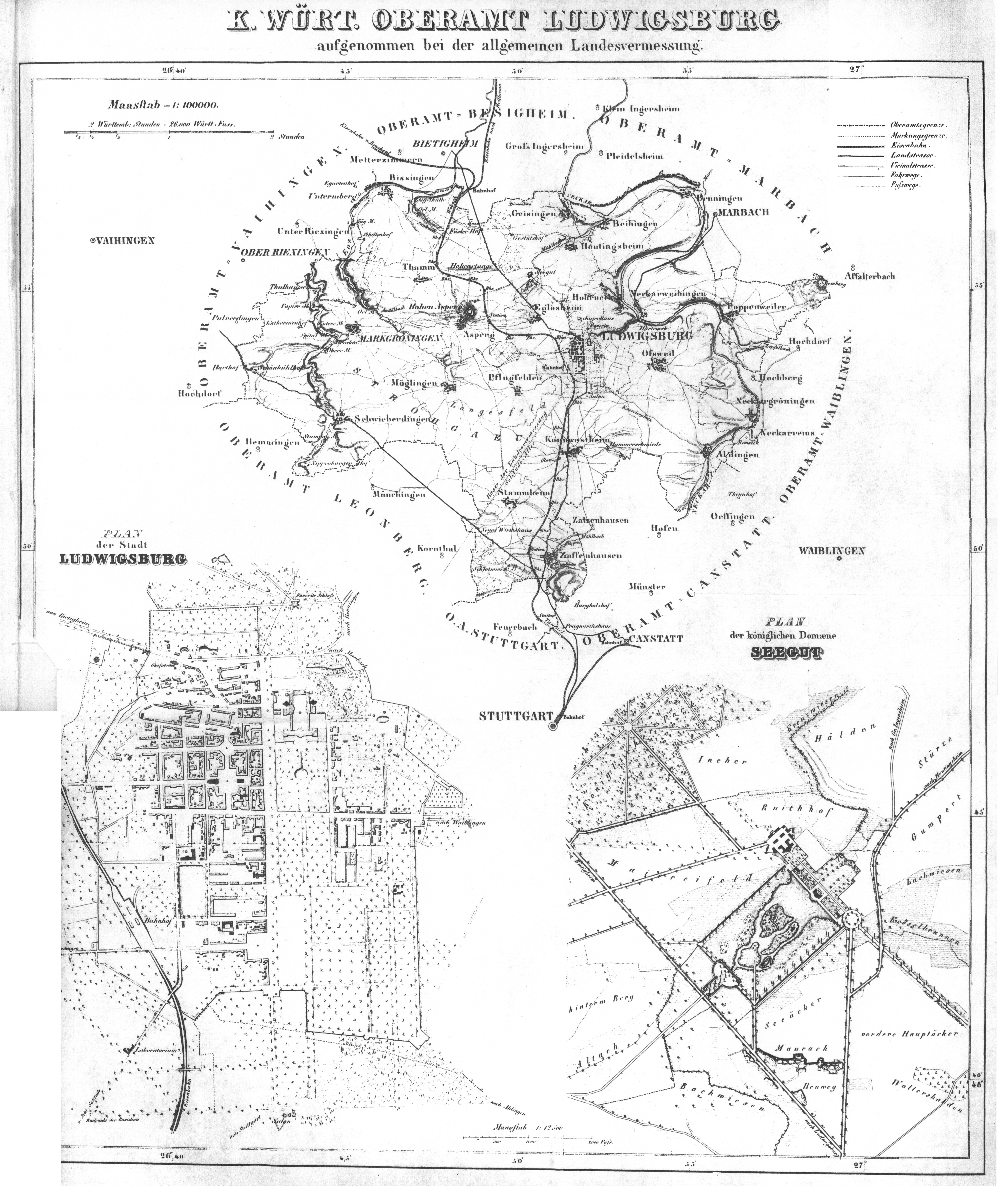 Beschreibung des Oberamts Ludwigsburg